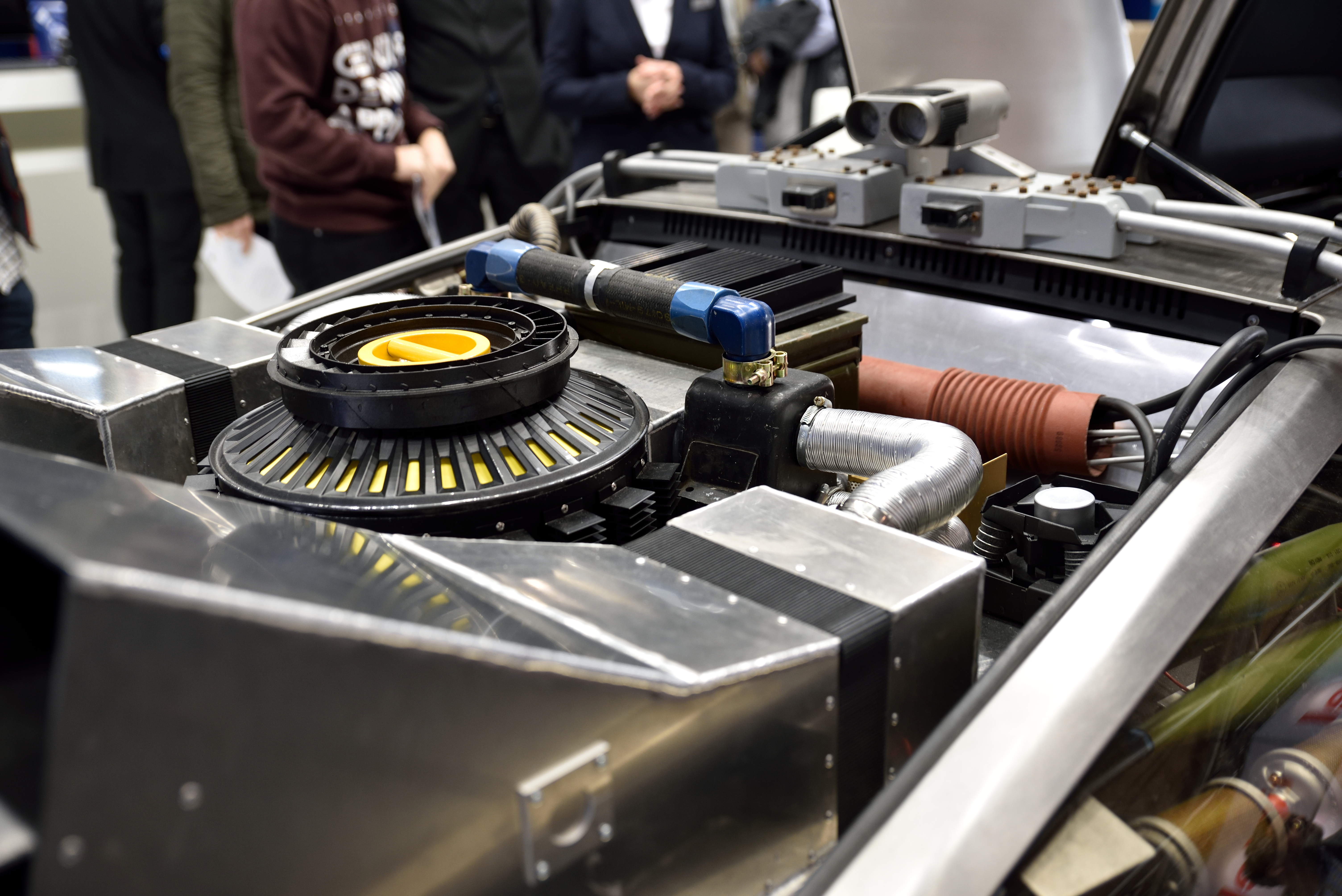 Der DeLorean DMC-12 aus dem Film Zurück aus der Zukunft (Back to the Future) bei der CeBIT 2016 in Hannover